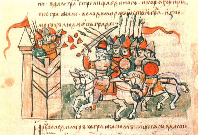 Княжа дружина. Похід Володимира на Корсунь (Херсонес). Радзивілівський літопис